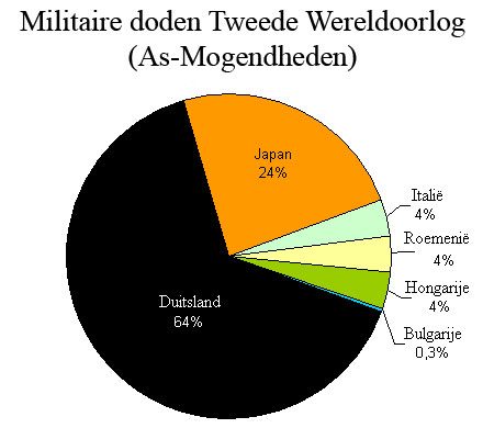 Procentueel overzicht van het aantal gedode militairen van de asmogendheden gedurende de Tweede Wereldoorlog.